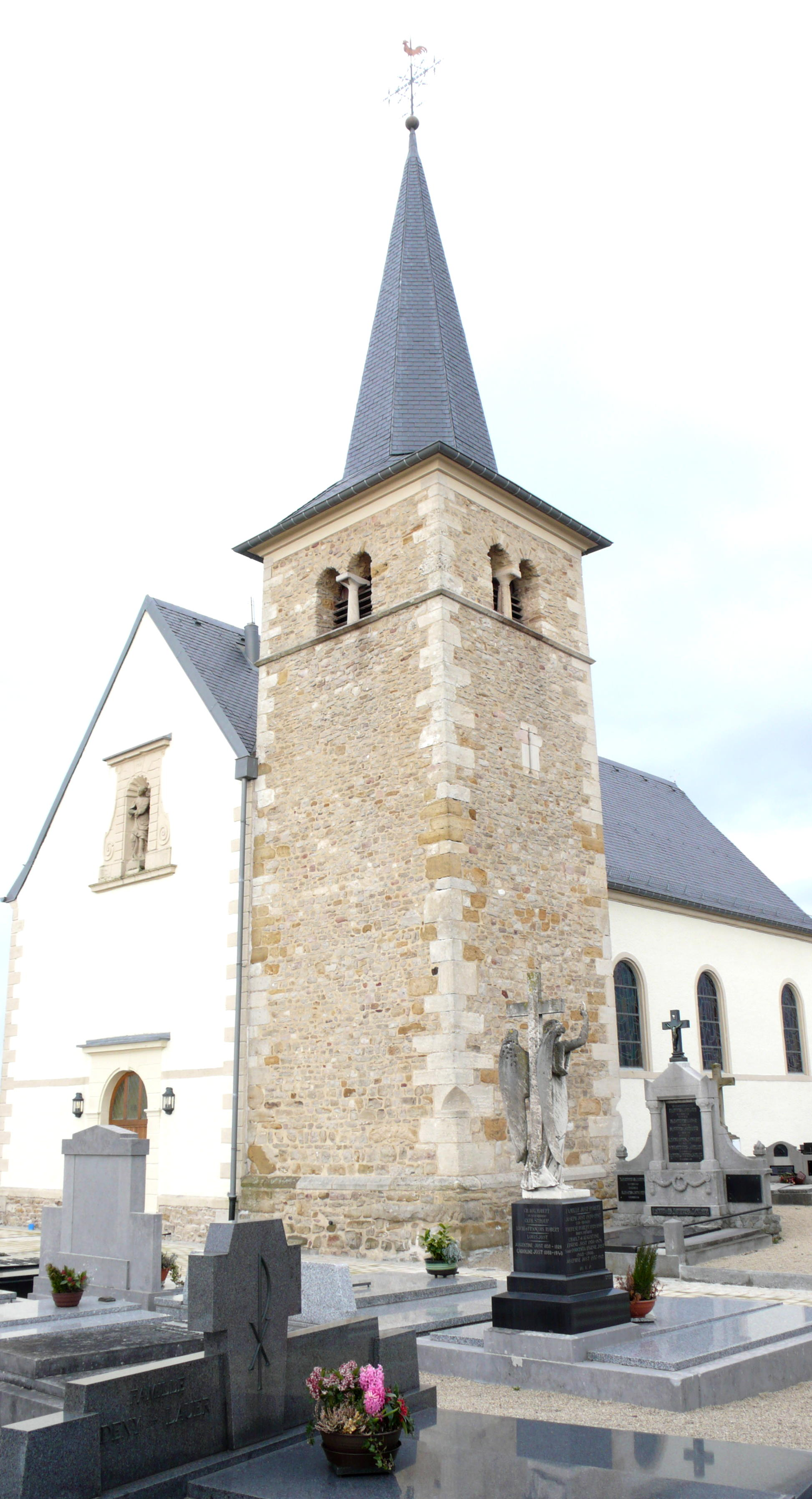 L'église de Frisange (Luxembourg)